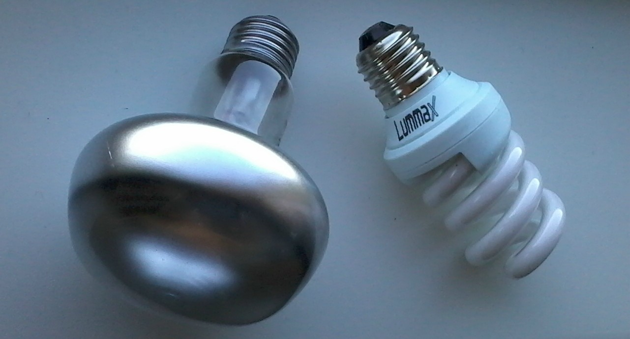 знято мобілкою Самсунг